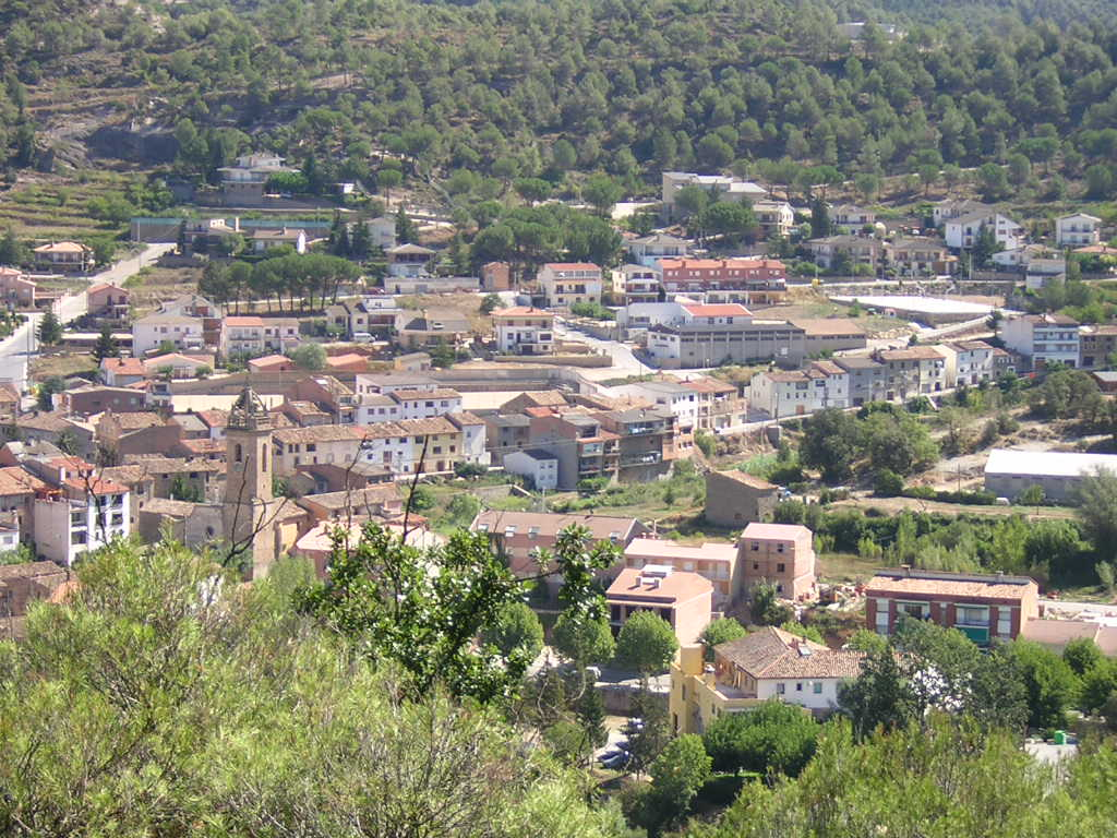 Monistrol de Calders (Moianès)